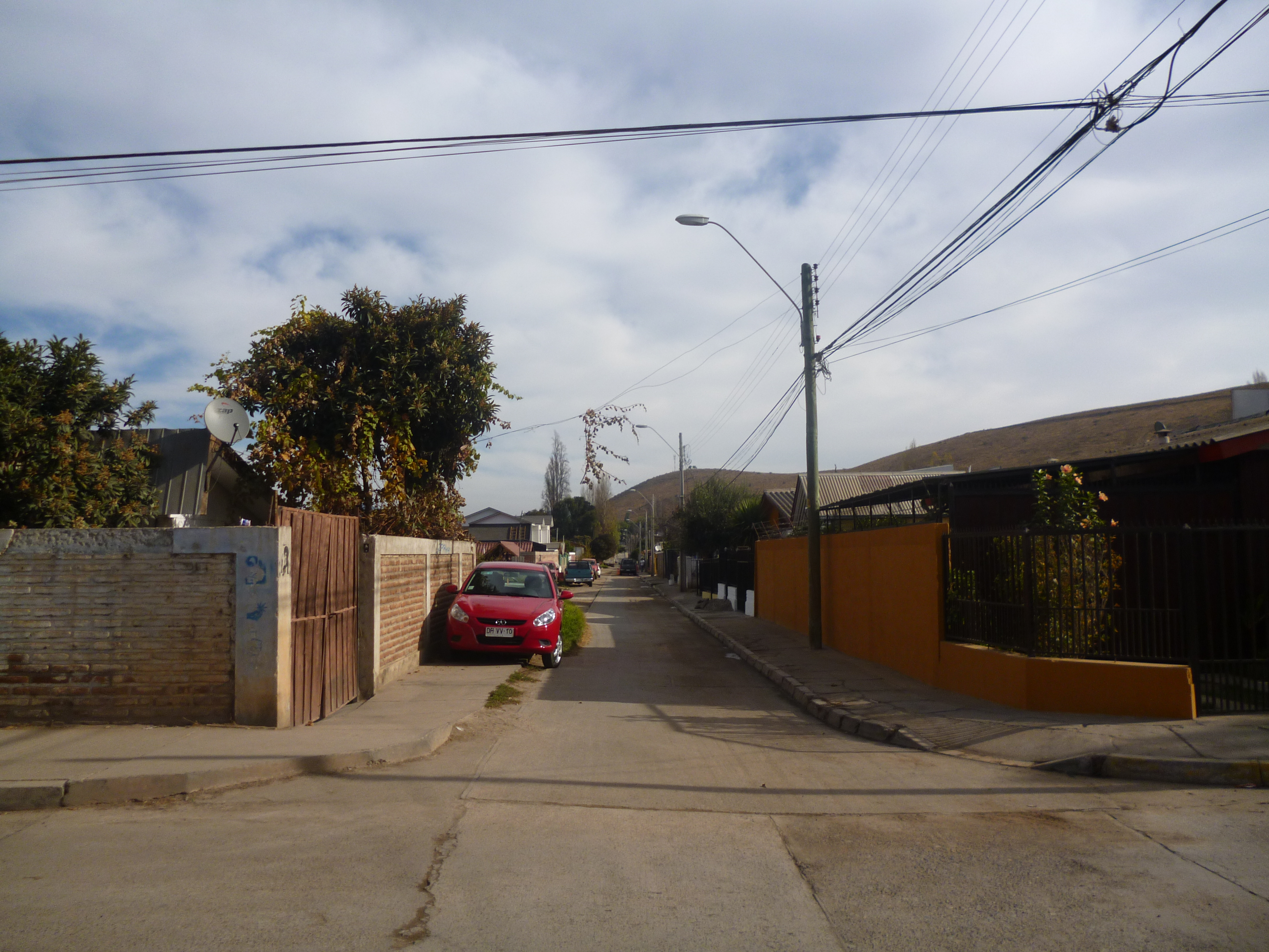 Poblacion La Recsi